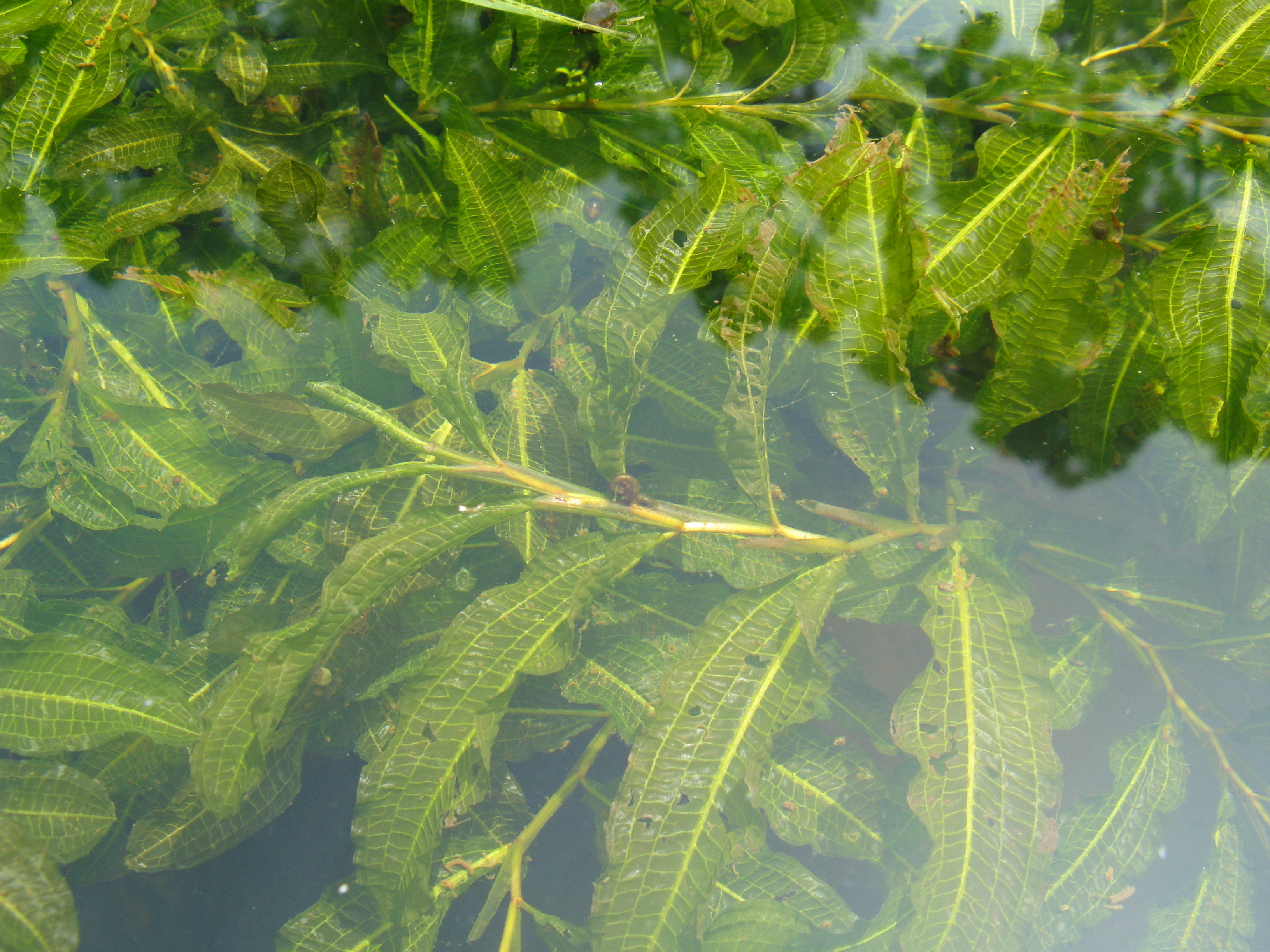 Scientific name Potamogeton dentatus